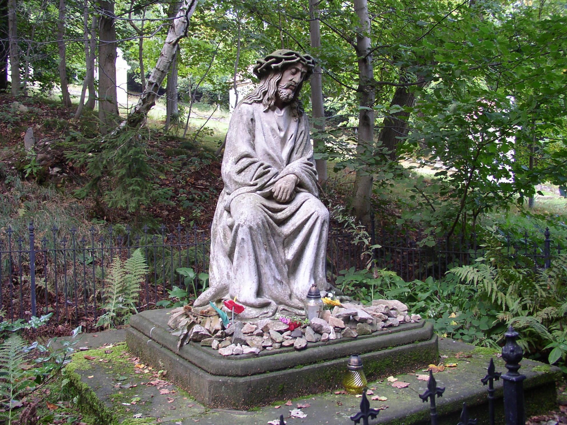 Socha Krista, areál kaple Ukřižování, Jiřetín pod Jedlovou.